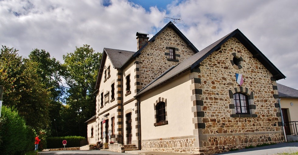 La Mairie